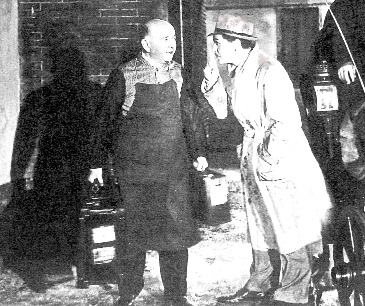 Emilio Petacci ed Andrea Checchi in Piccolo hotel (Ballerini, 1939)